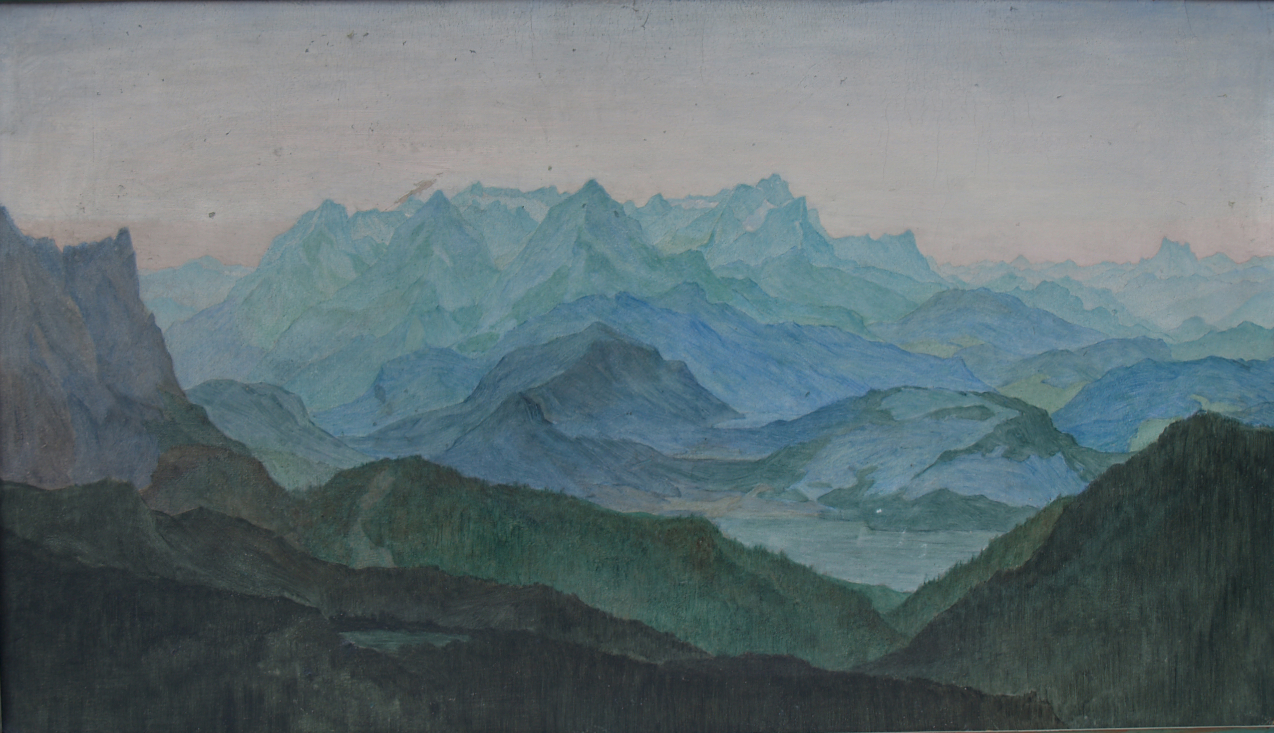 Wettersteingebirgetitle QS:P1476,de:"Wettersteingebirge" label QS:Lde,"Wettersteingebirge"